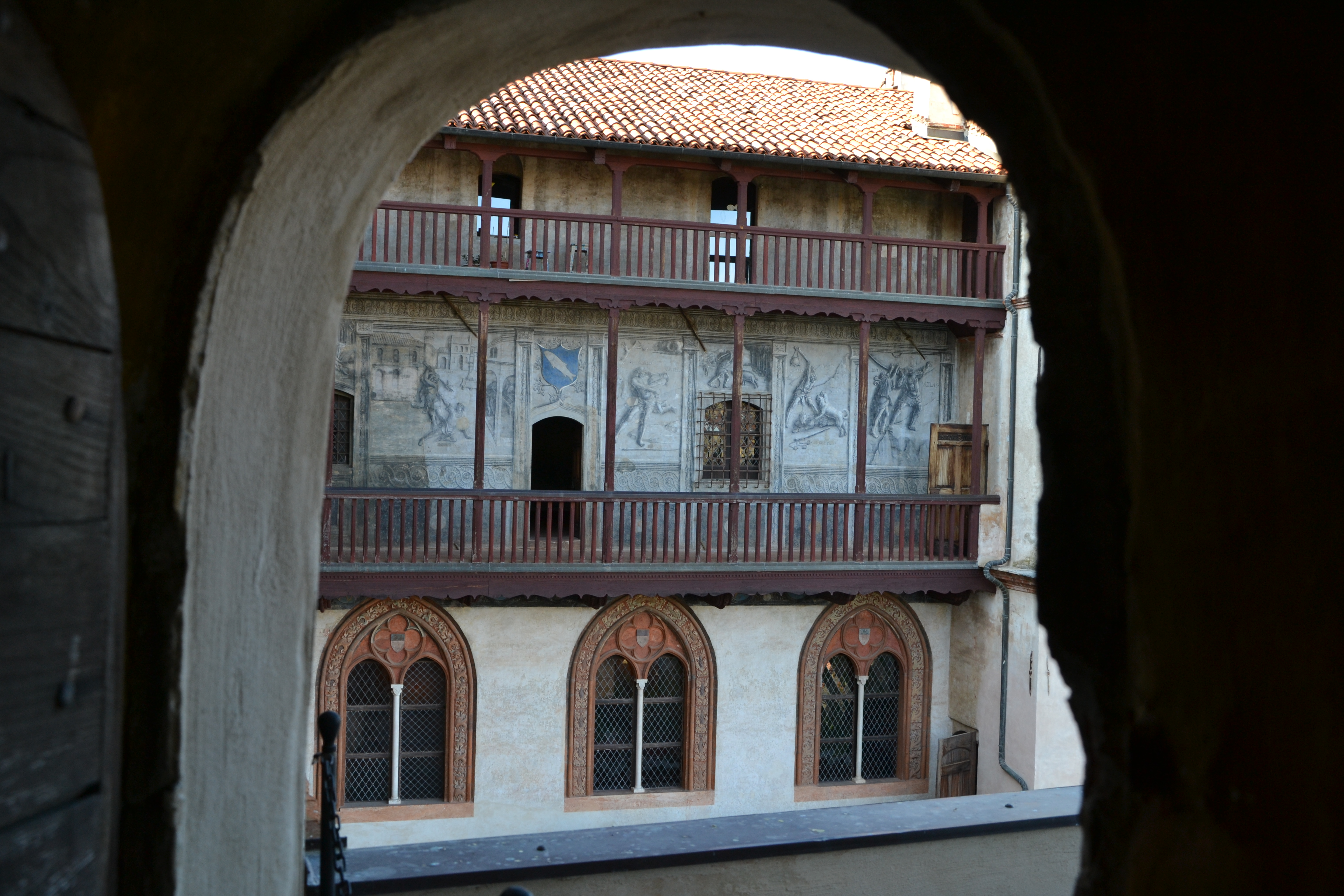 affreschi a monocromo raffiguranti le Fatiche di Ercole realizzati tra il 1506 ed il 1511 da Hans Clemer, artista di origine fiamminga che opera a Saluzzo dal 1490 al 1511.